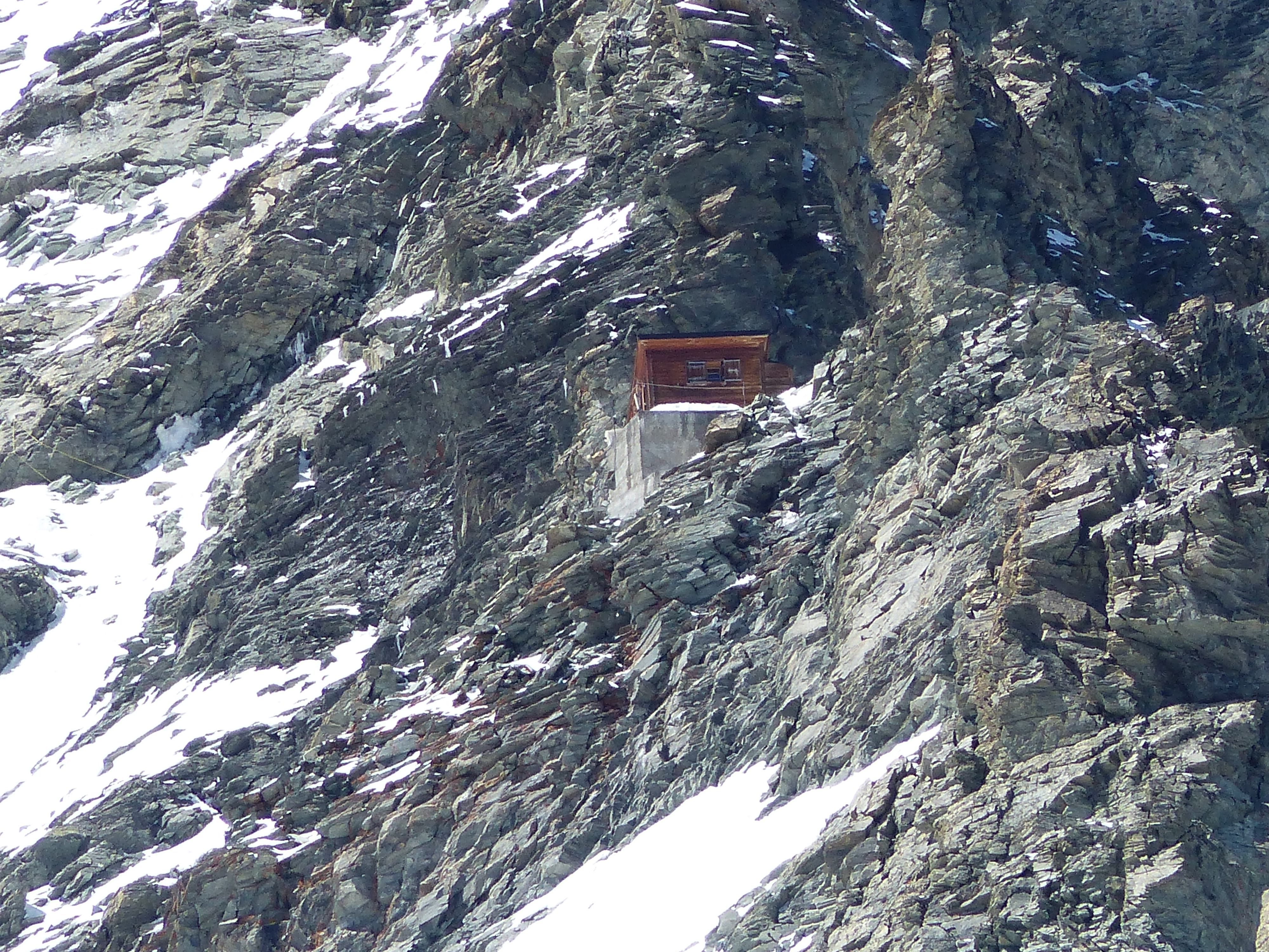 Solvayhütte (Blick von der Hörnlihütte)